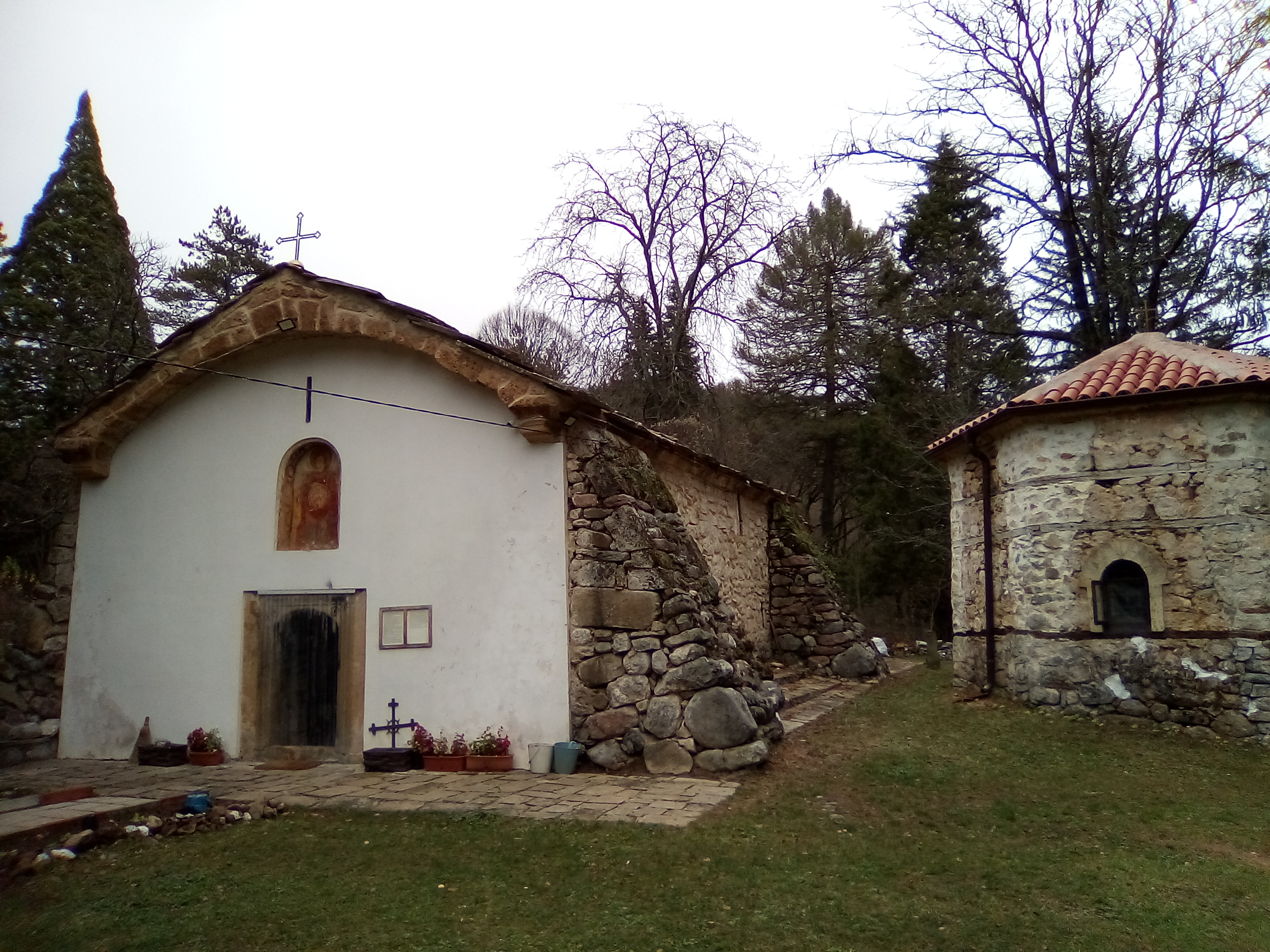 снимка1